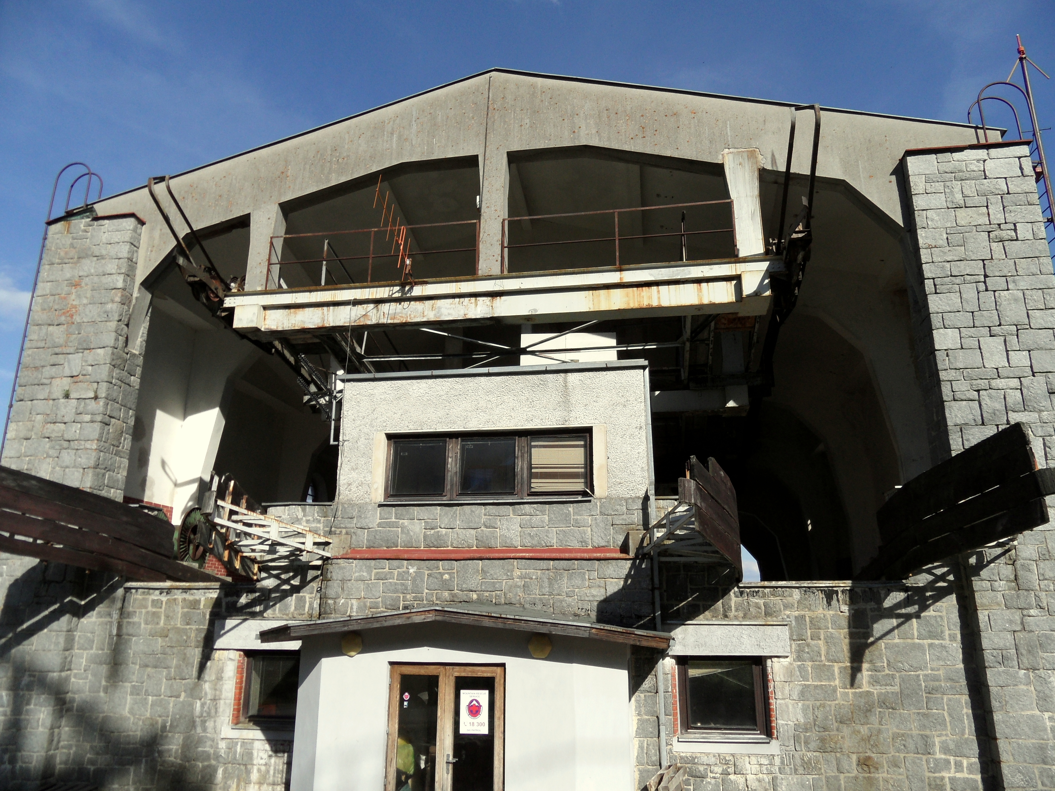 Medzistanica Štart